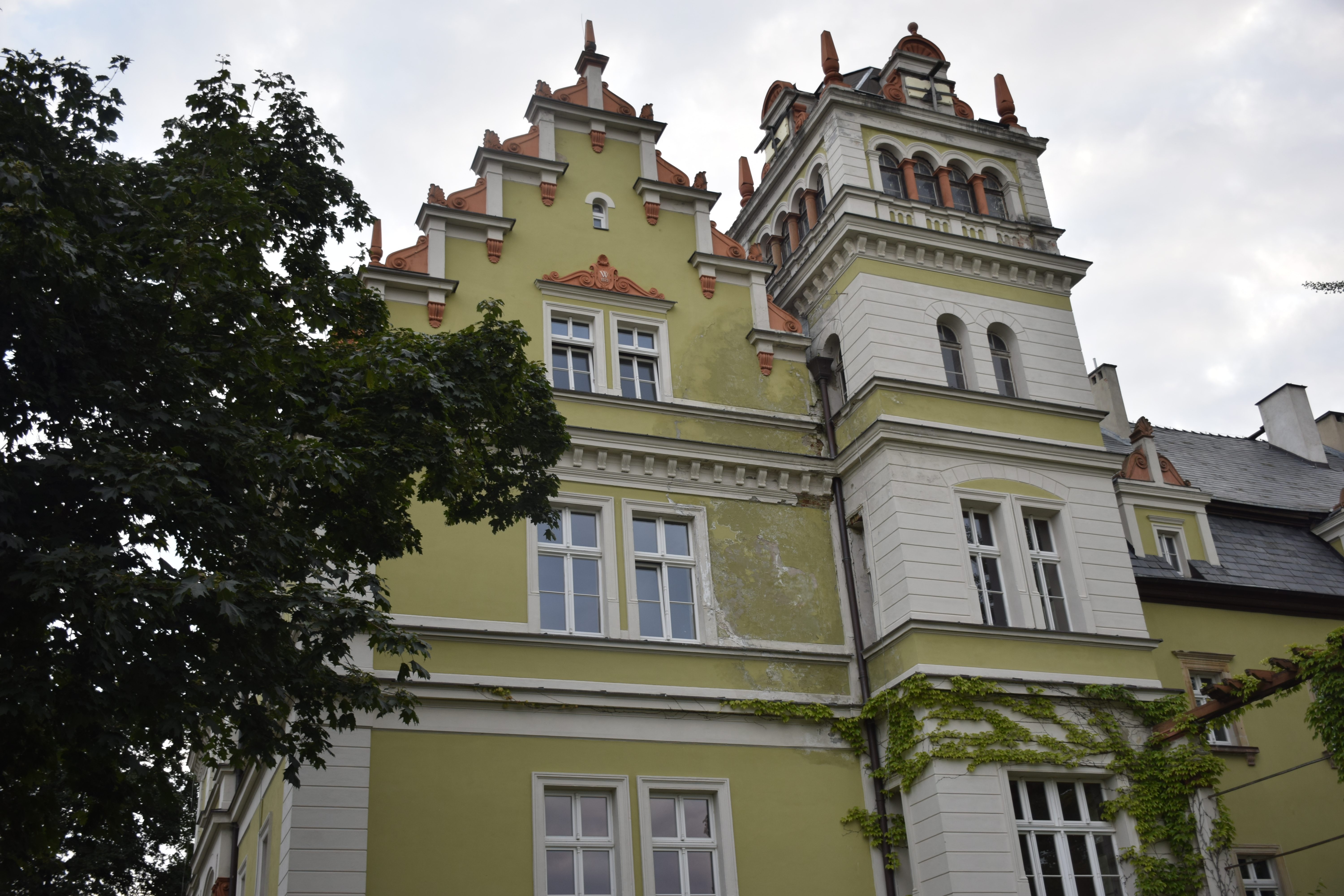 Kłonice. Polska.